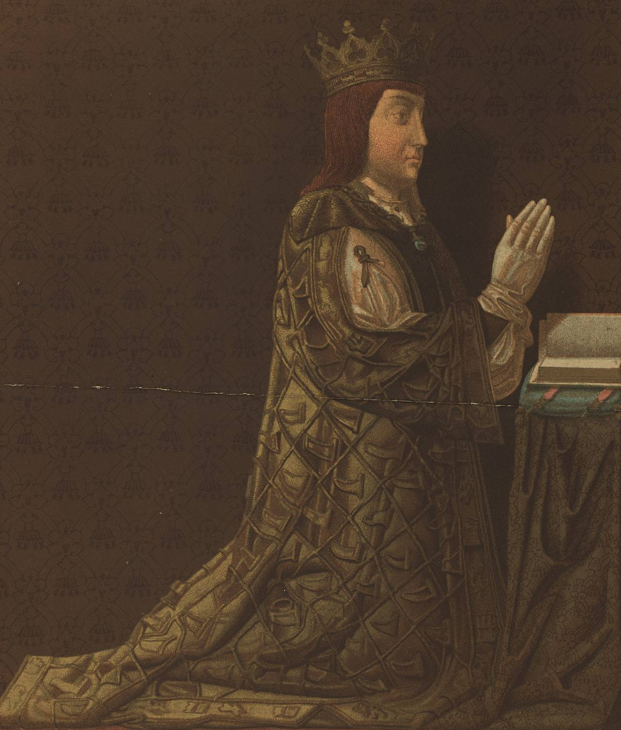 D. Juan II, siglo XV : Retablo de la Cartuja de Miraflores, Burgos. Indumentaria española : documentos para su estudio, desde la época visigoda hasta nuestros dias (Lám. 54).